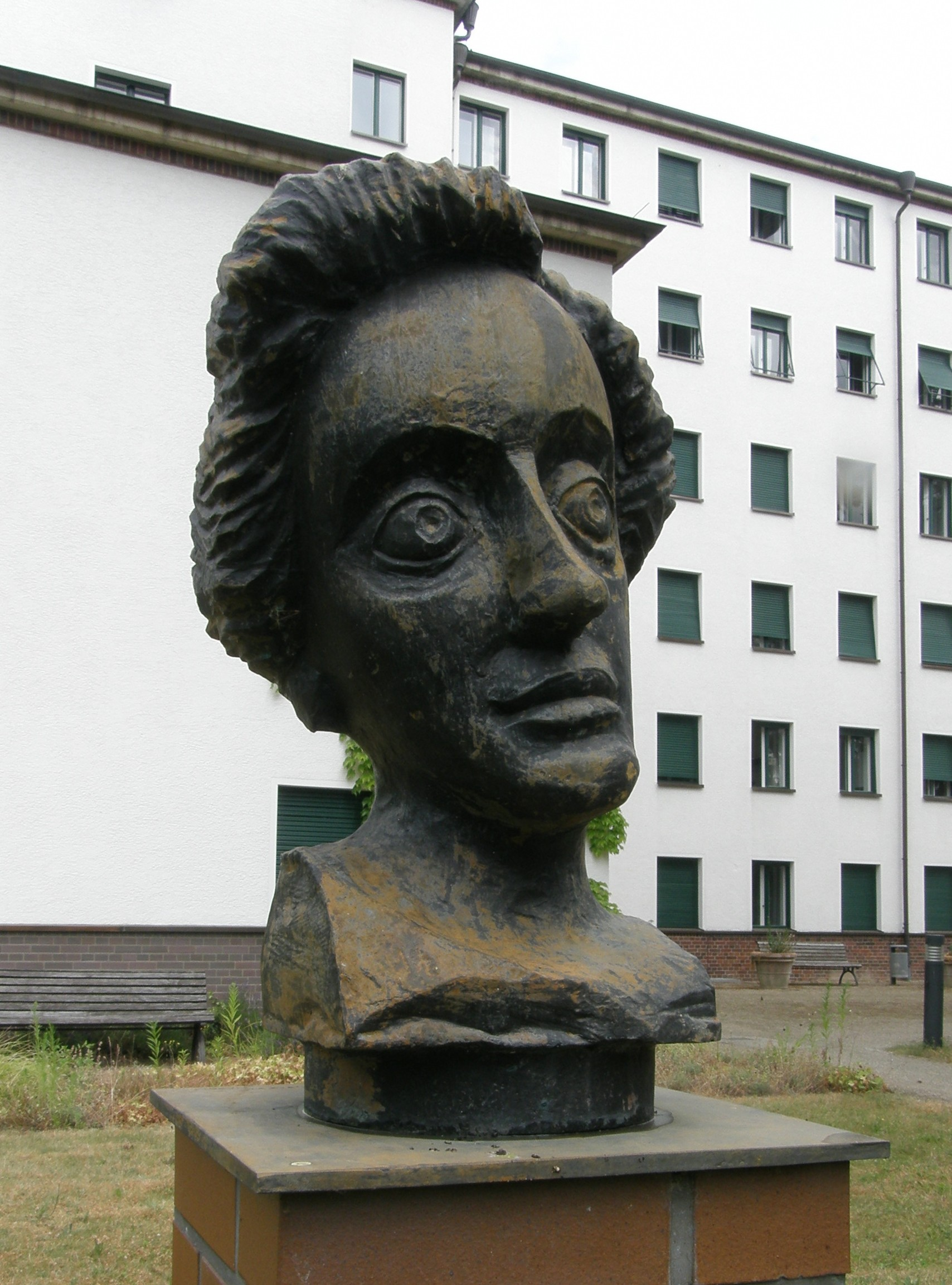 Bronzene Büste der Hirnforscherin Cécile Vogt. Geschaffen 2002 von Hans Scheib. Standort auf dem biomedizinischen Campus Berlin-Buch vor dem ehemaligen Institut für Hirnforschung.